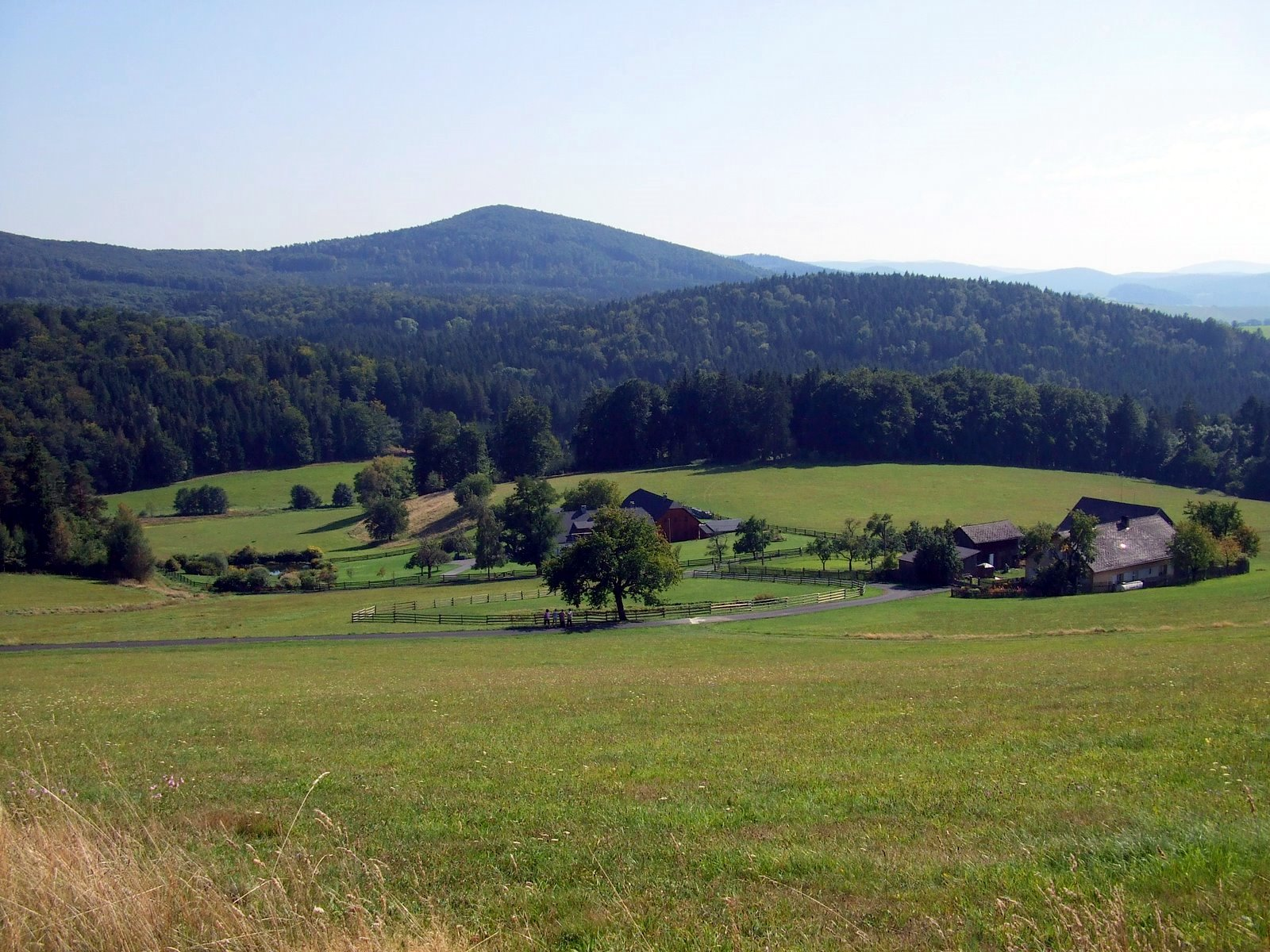 pohled ze Šteflí směrem na kopec Jezvinec